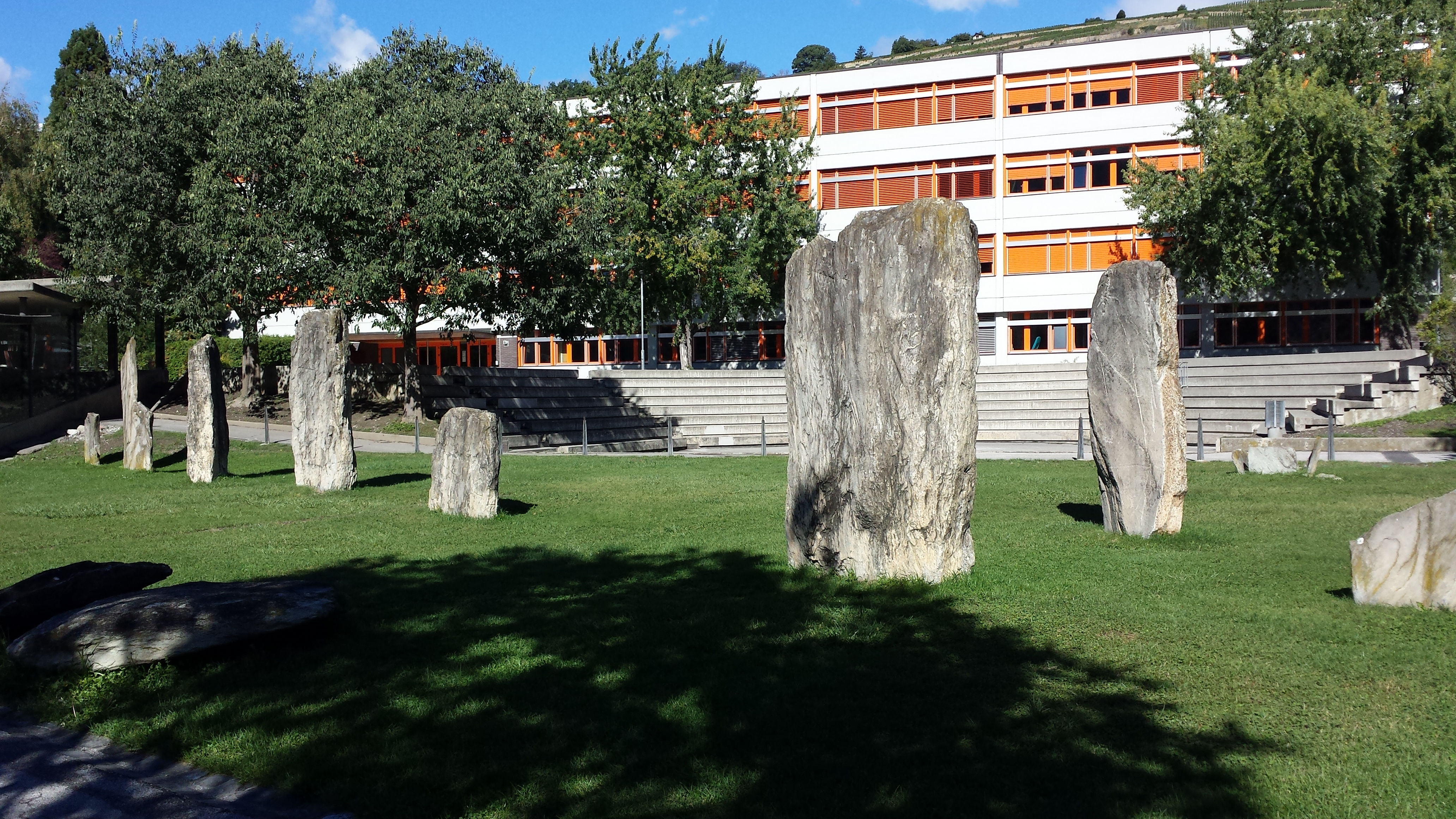 Chemin des Collines (Menhire und archäologische Zone)